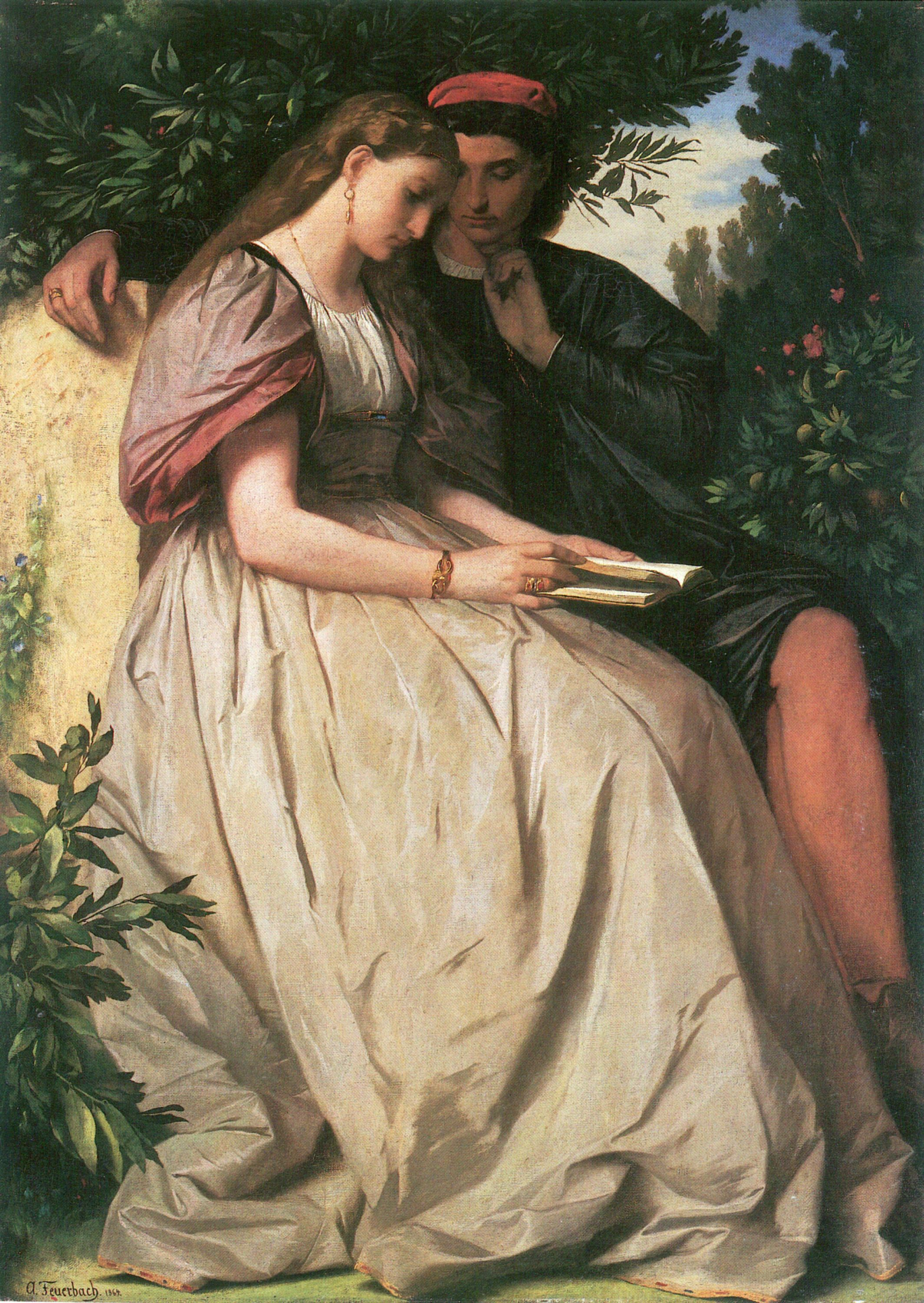 Das junge Liebespaar entdeckt beim Lesen des Romans von Lancelot ihre beiderseitige Liebe, dessen Tragik sie sich bewußt werden.